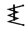 symbool Elektromagnetische meter